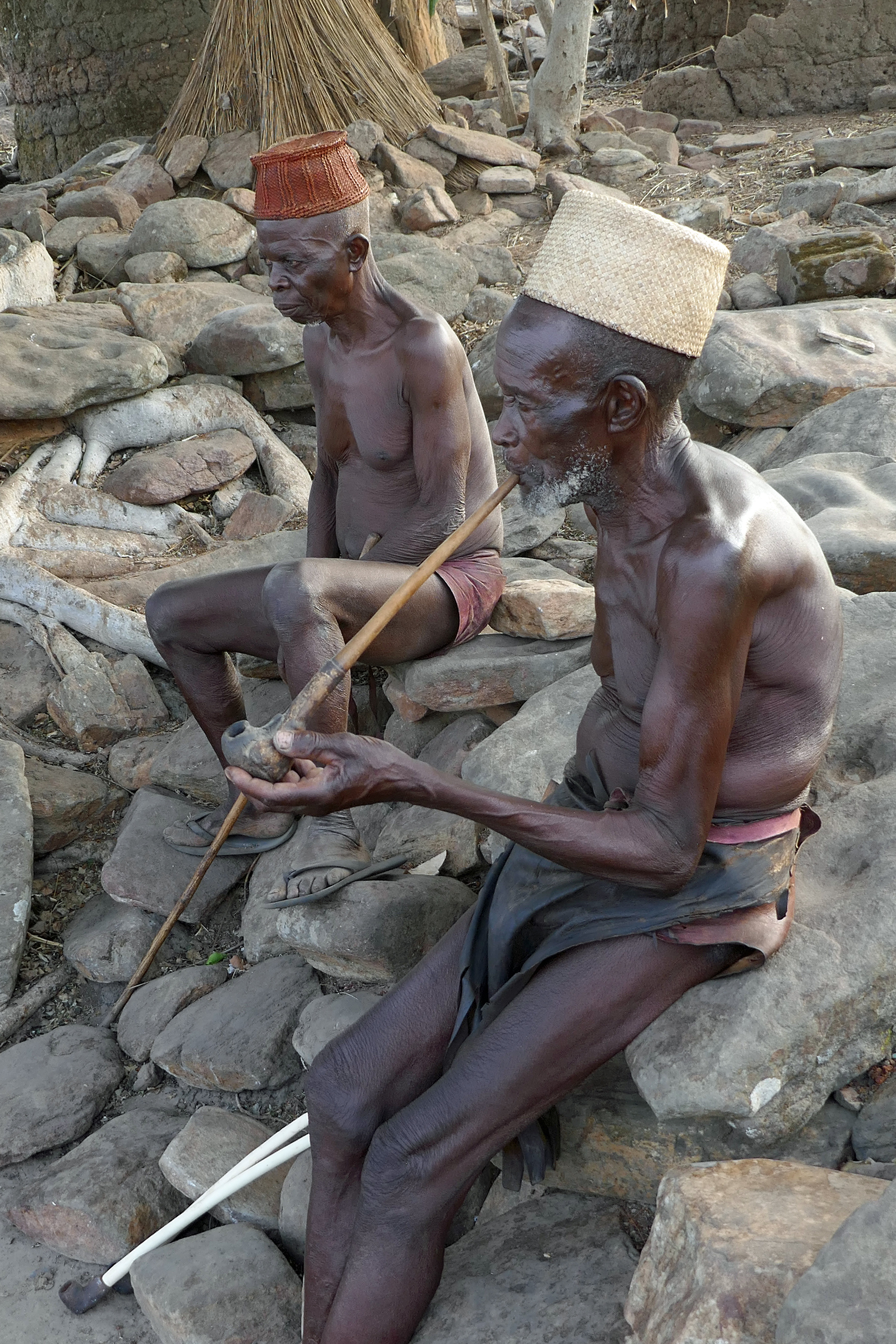 Deux des 9 dignitaires Tanéka du village de Tanéka-Béri (Bénin).